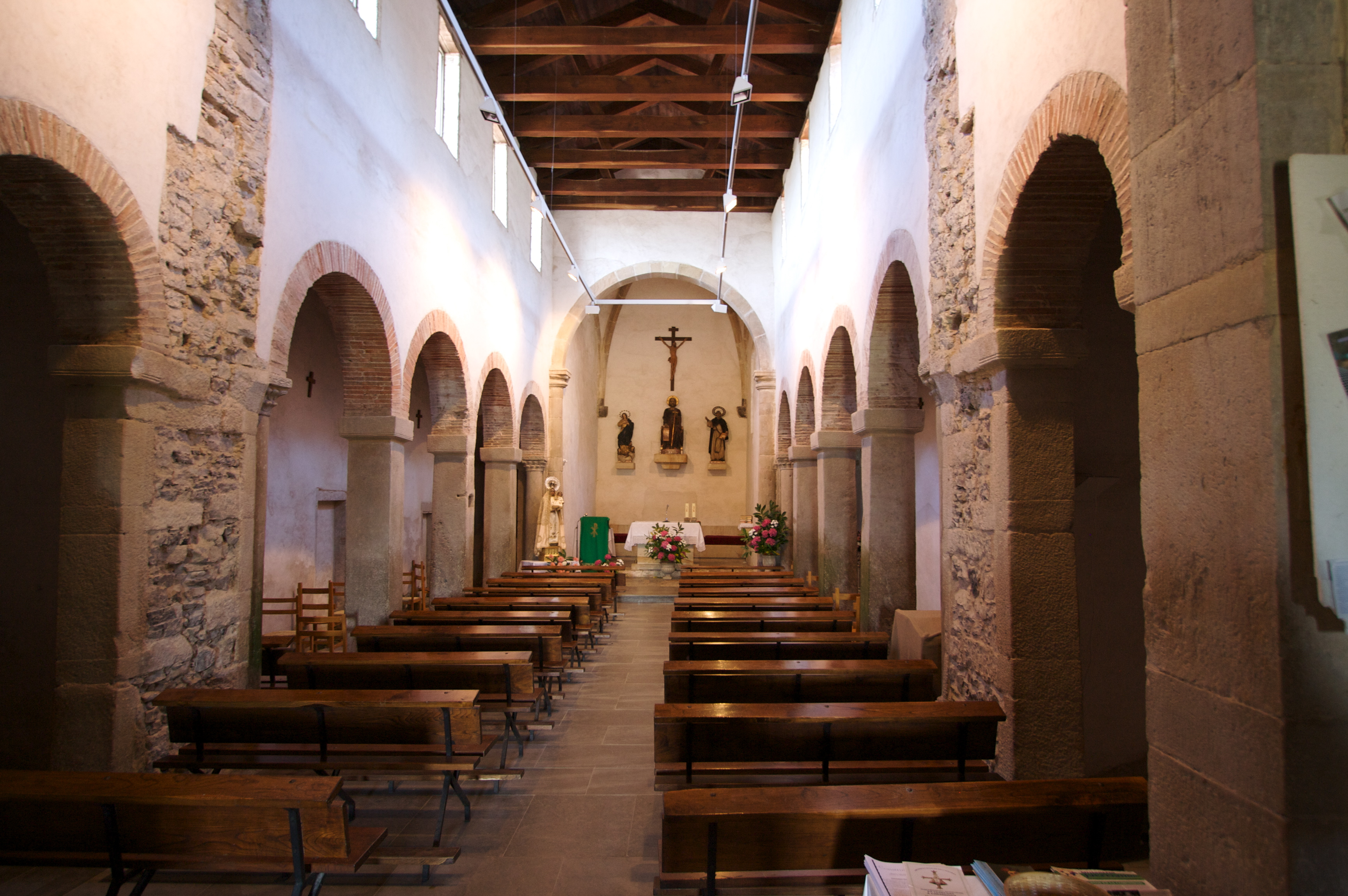 Iglesia prerrománica de Santiago de Gobiendes.